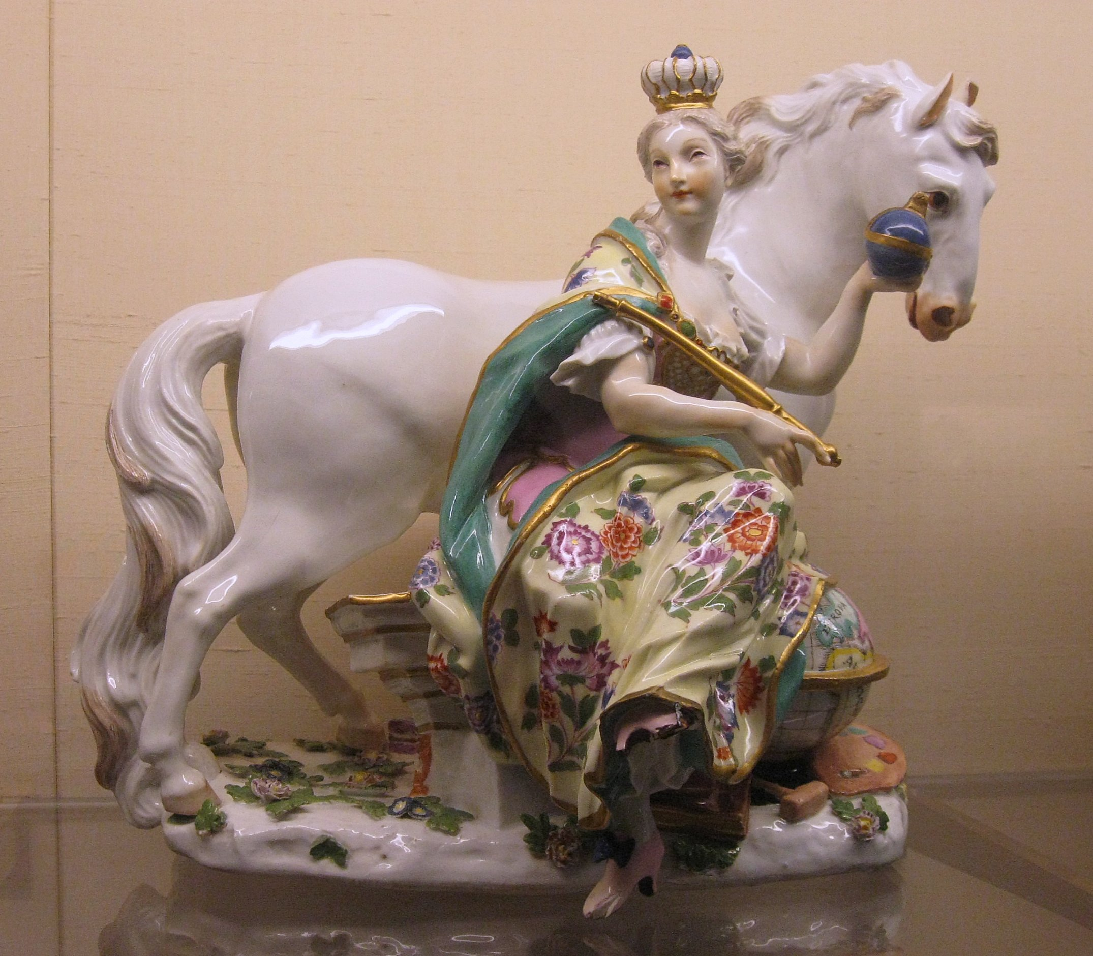 Erdteilgruppe, Europa, Johann Friedrich Eberlein, 1746-47, Meißener Porzellanmuseum im Schloss Lustheim, Oberschleißheim